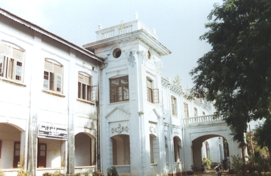 இராமநாதன் கல்லூரி, உடுவில், யாழ்ப்பாணம்